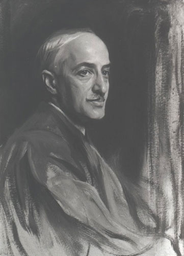 André Maurois, by Philip Alexius de László, 1934